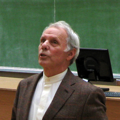 Юрий Васильевич Копаев — академик Российской академии наук, читает лекцию «Топологические проводники» для магистров факультета «Электроники и компьютерных технологий» МИЭТ